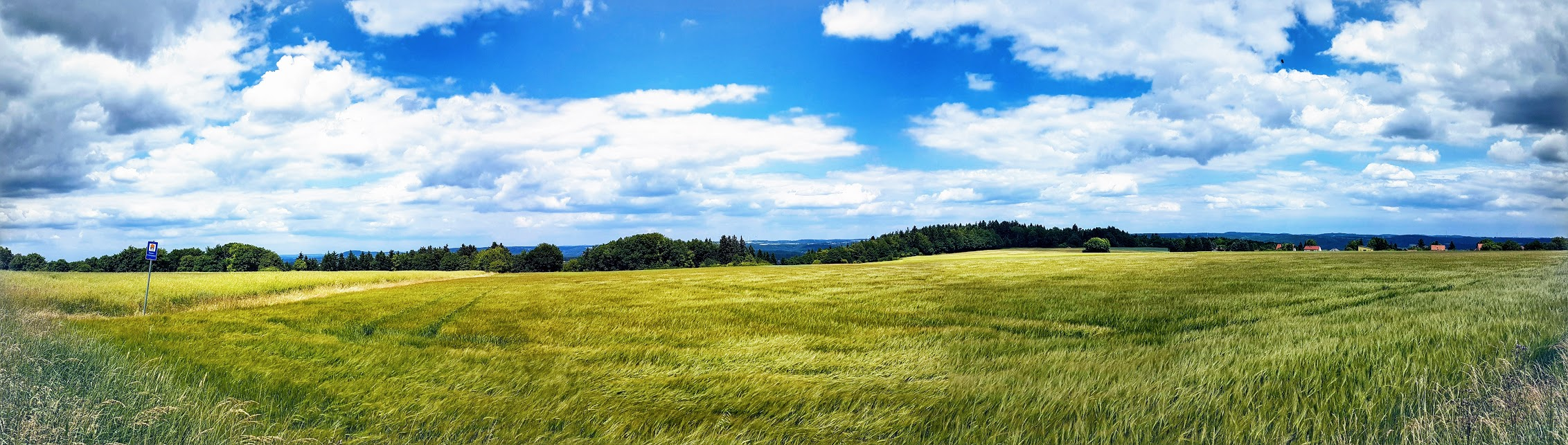 Ausblick Dillberg